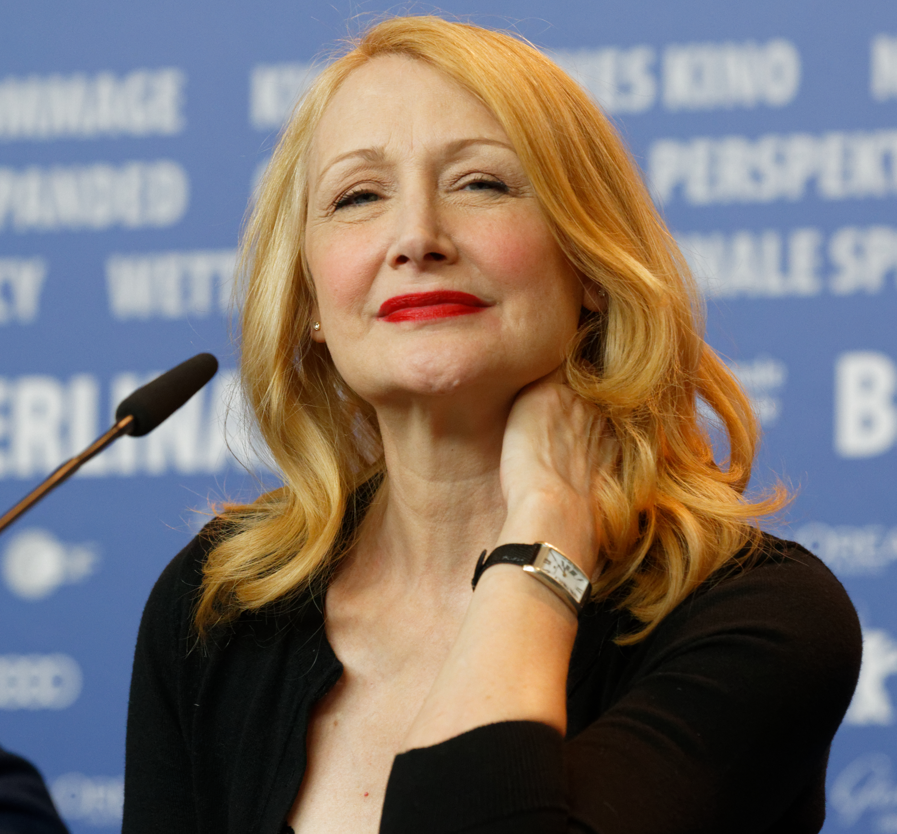 Patricia Clarkson bei der Pressekonferenz zu The Party bei der Berlinale 2017